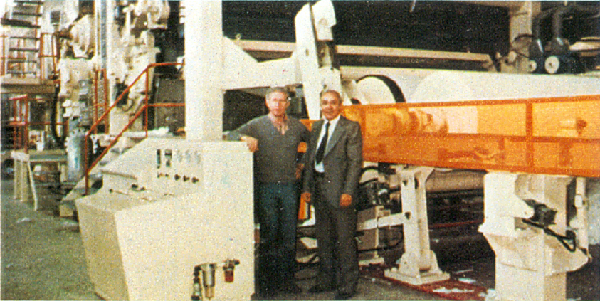 Ο Πάνος Ζερίτης στο εργοστάσιο Sladkogorska το 1976